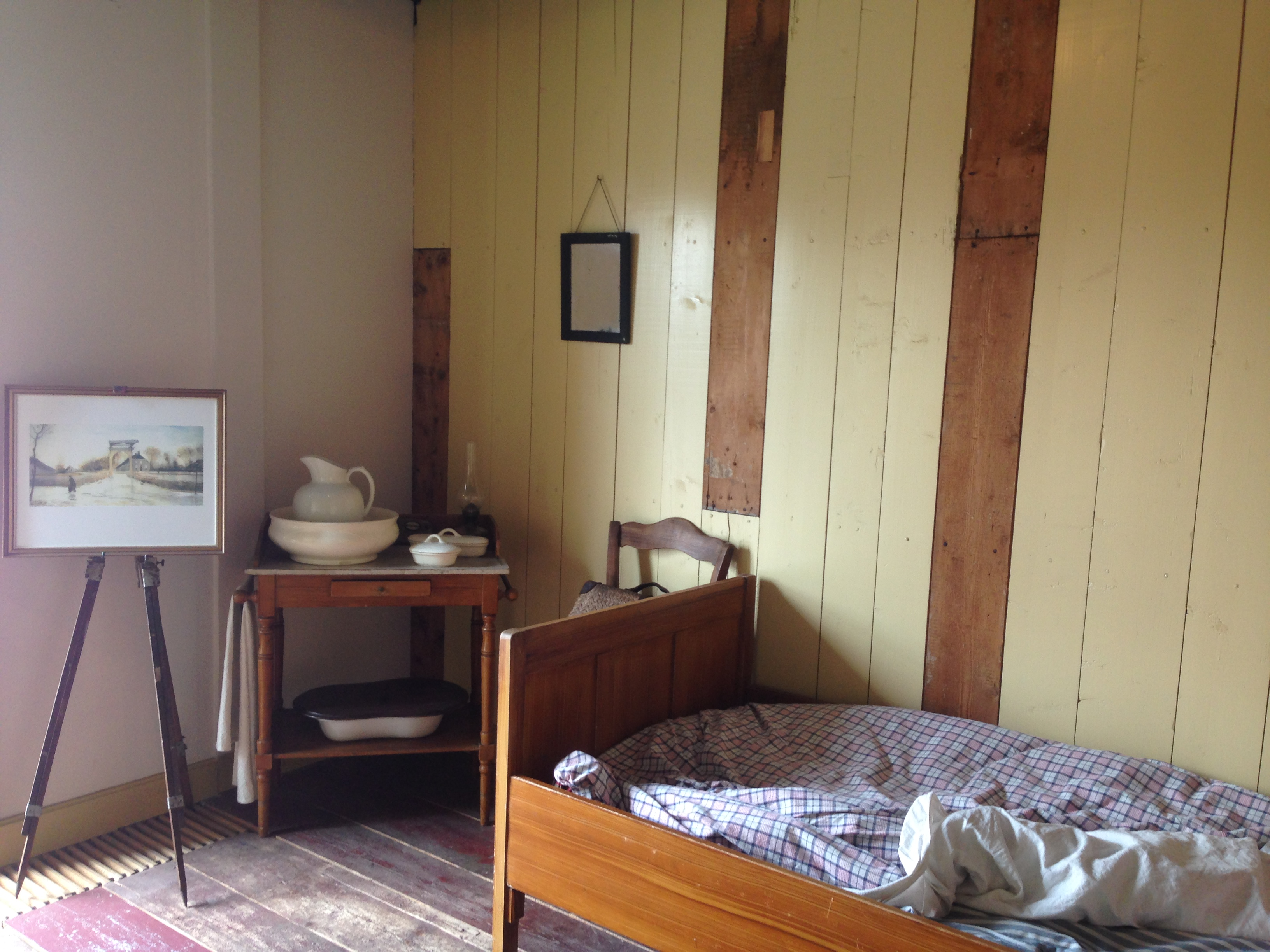 Van Gogh Huis, Veenoord, Drenthe, Netherlands